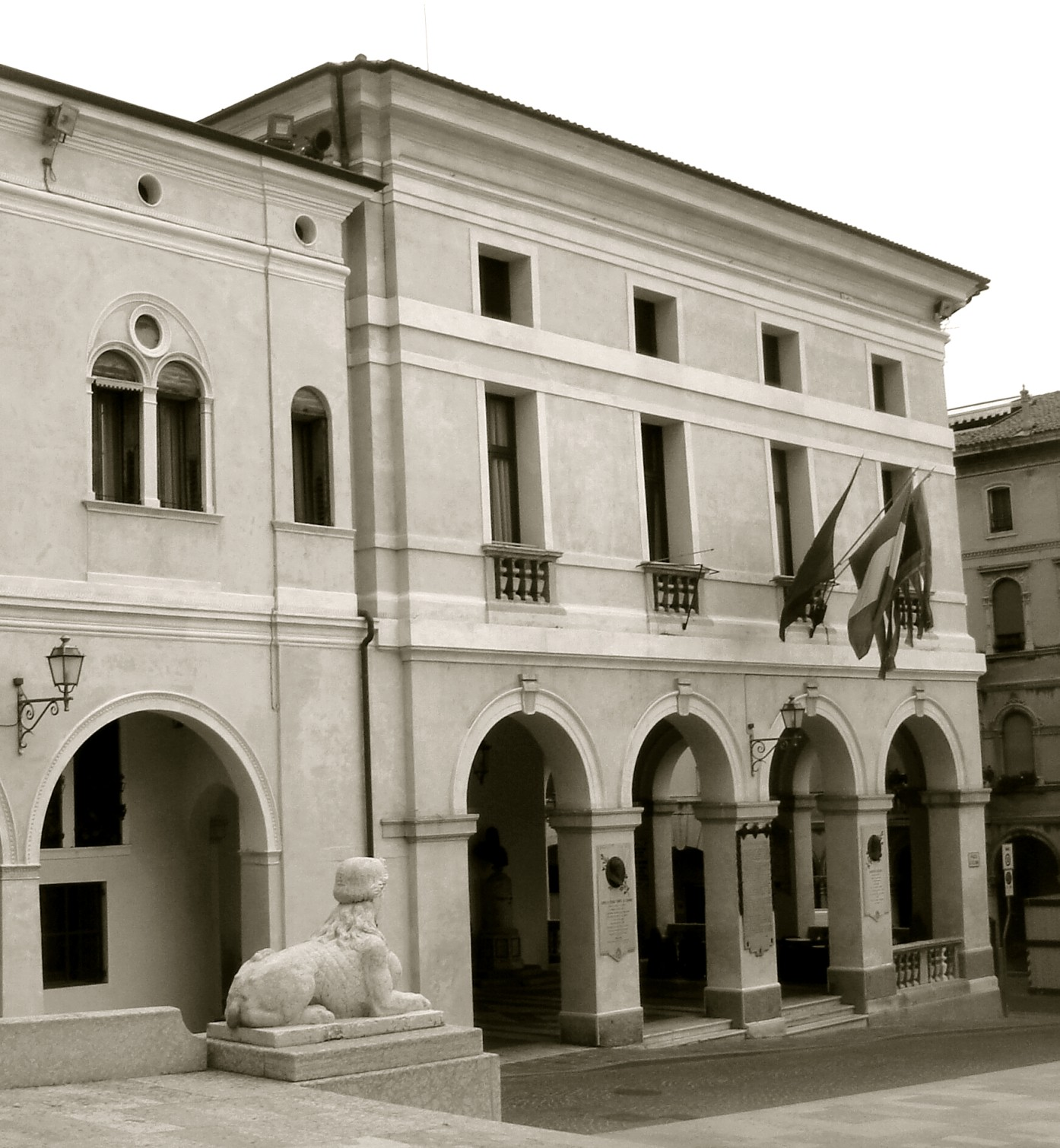 Conegliano (Treviso): Municipio (XVIII sec.), facciata su piazza Cima; sulla sinistra una delle sfingi del Teatro Accademia.